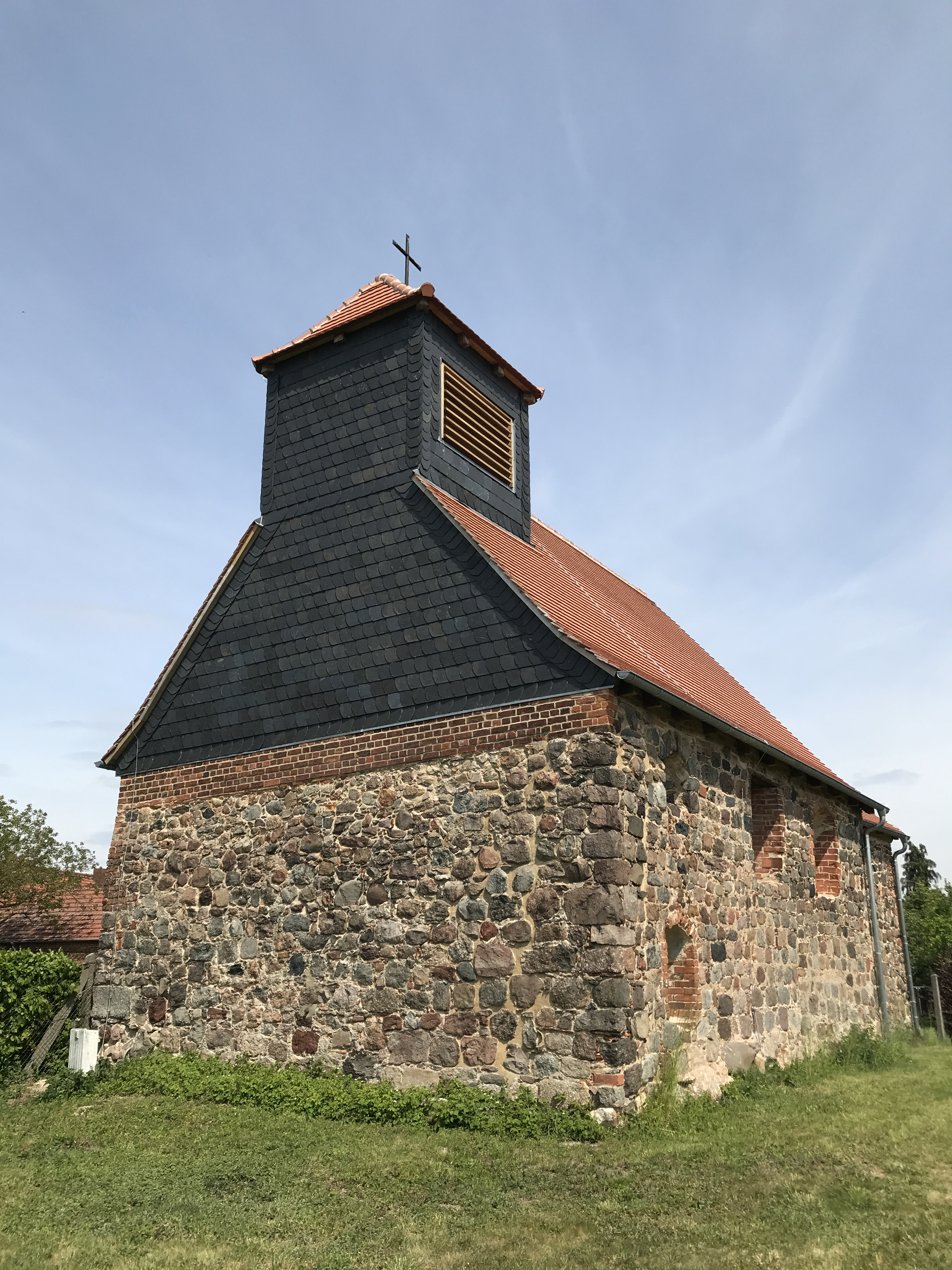 Die evangelische Dorfkirche Lichterfelde ist eine Feldsteinkirche aus dem 13. Jahrhundert in Lichterfelde, einem Ortsteil der Gemeinde Niederer Fläming im Landkreis Teltow-Fläming im Land Brandenburg.